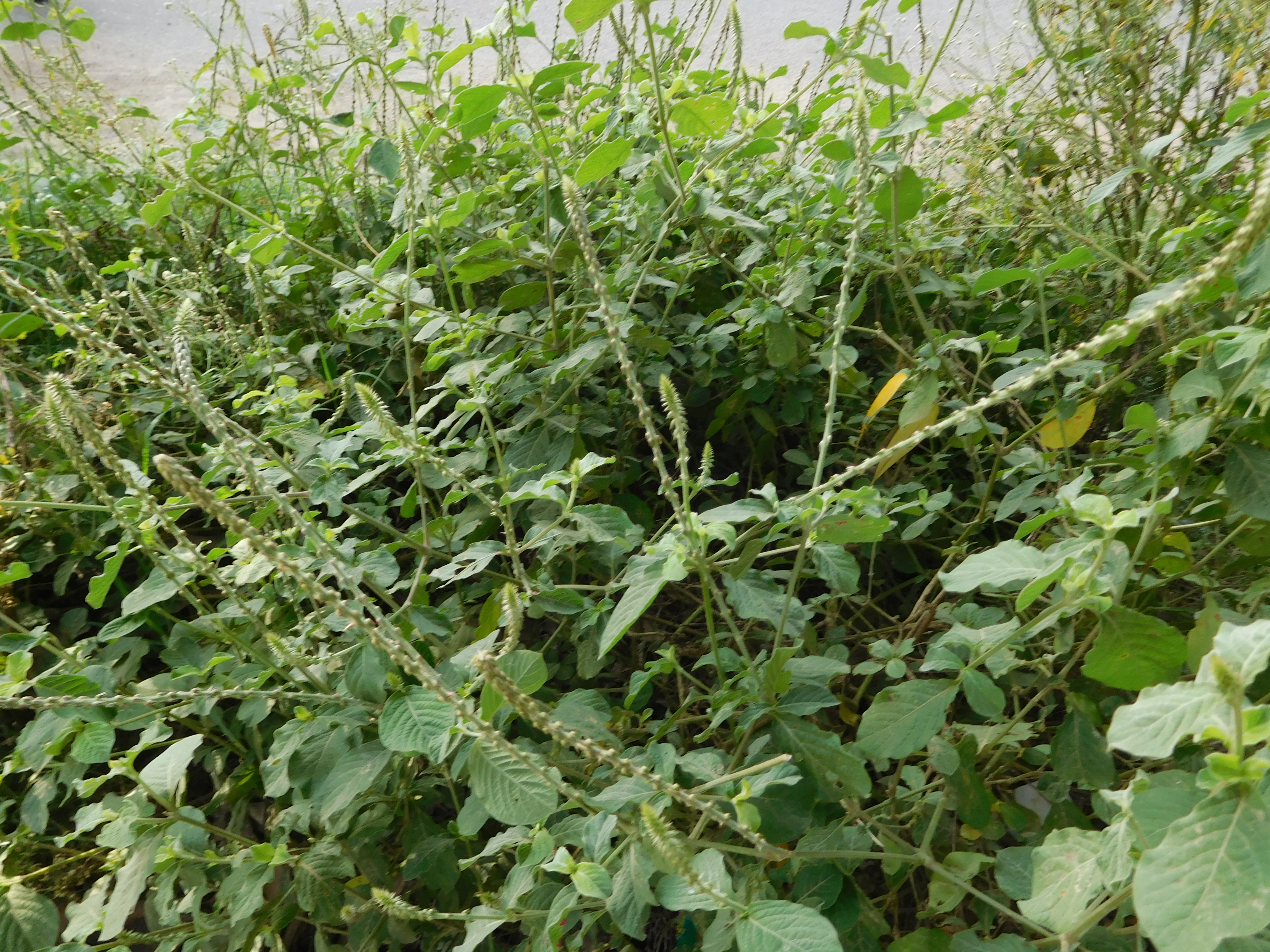 लटजीरा (अपामार्ग )औषधीय पादप